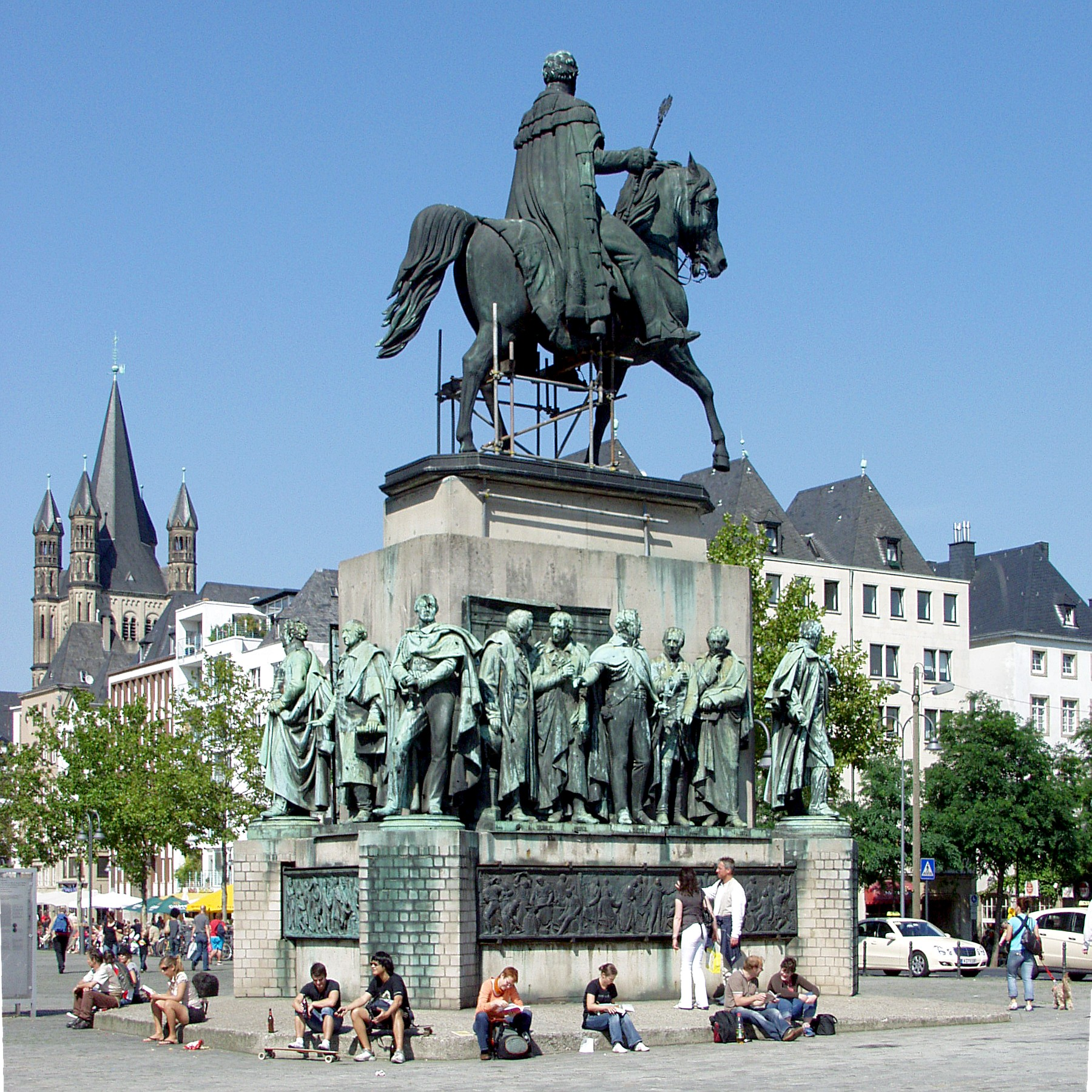 Friedrich Wilhelm III.-Reiterstandbild auf dem Kölner Heumarkt. Gesamtansicht. This is a photograph of an architectural monument.